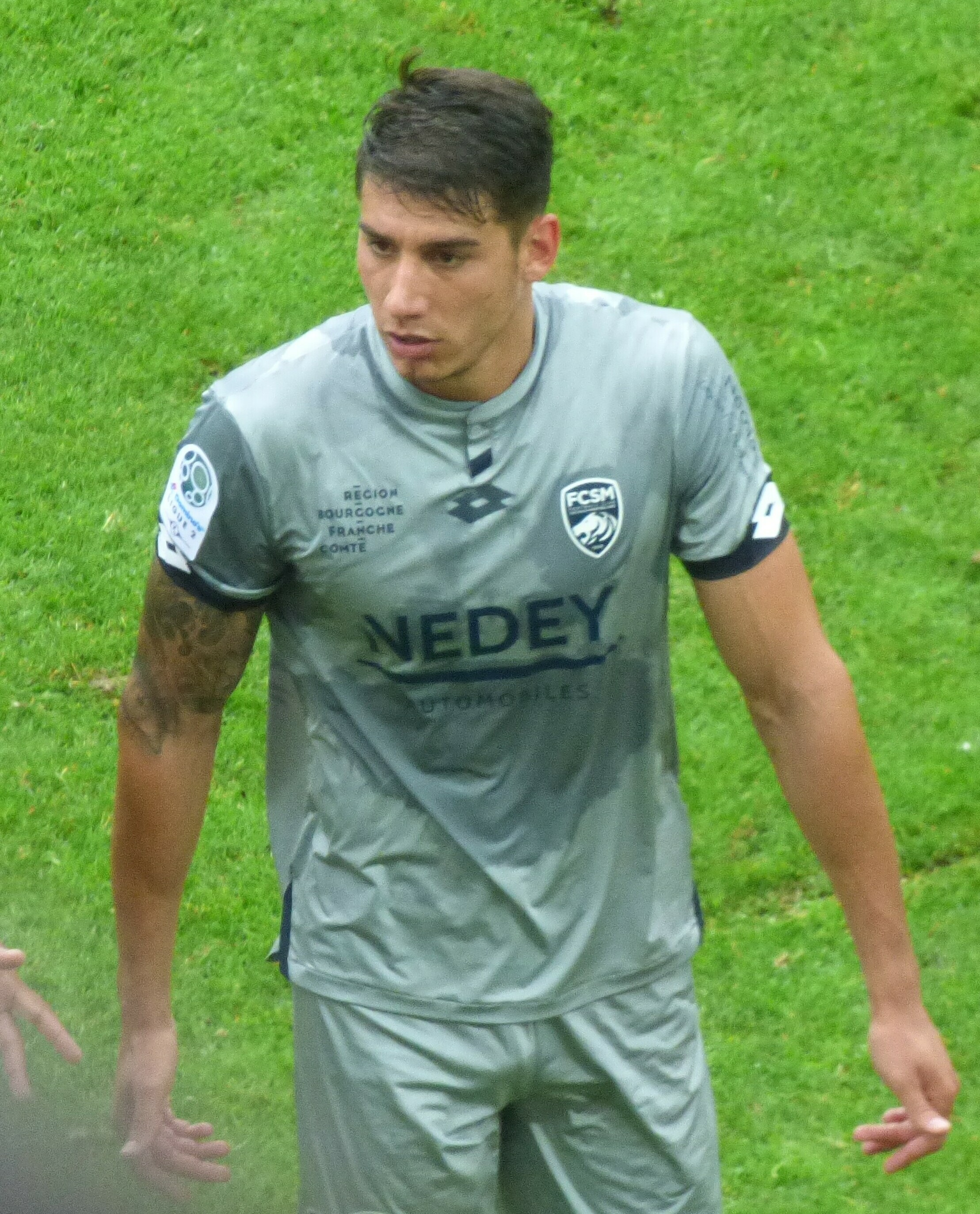 Rafa Paez lors du match Lens / Sochaux, comptant pour la septième journée du championnat de France de football de Ligue 2, le 15 septembre 2018.